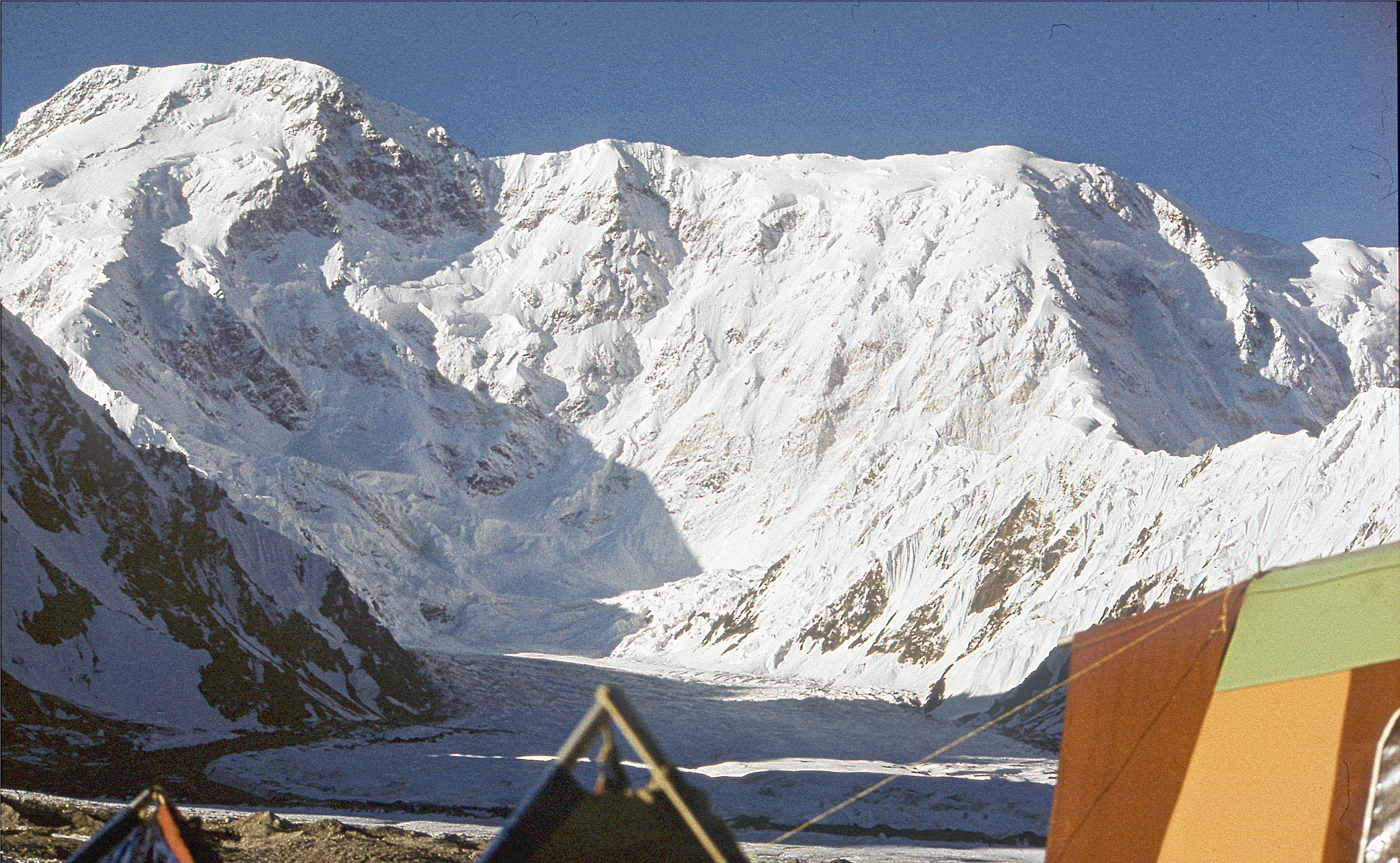 Džengiš ehk Pobeda.